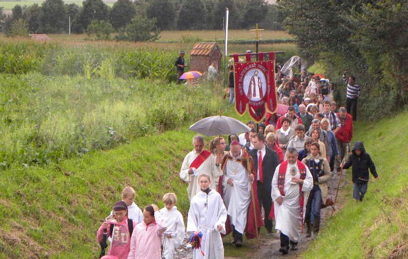 Tour de la SaintBarthelmey 2011 Bousval - Belgique Evêque en chemin. Bannière.